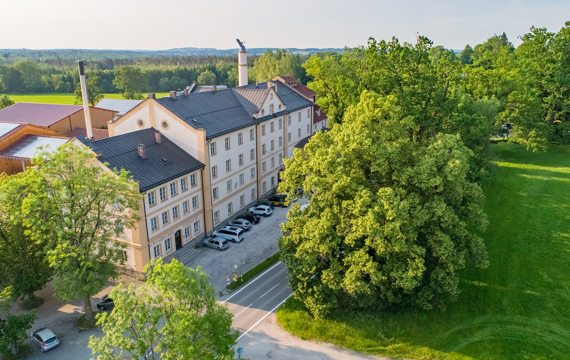 Das Jugendstilgebäude entstand Anfang des 20. Jahrhunderts, als die Bierproduktion aus dem Schloss verlegt wurde.